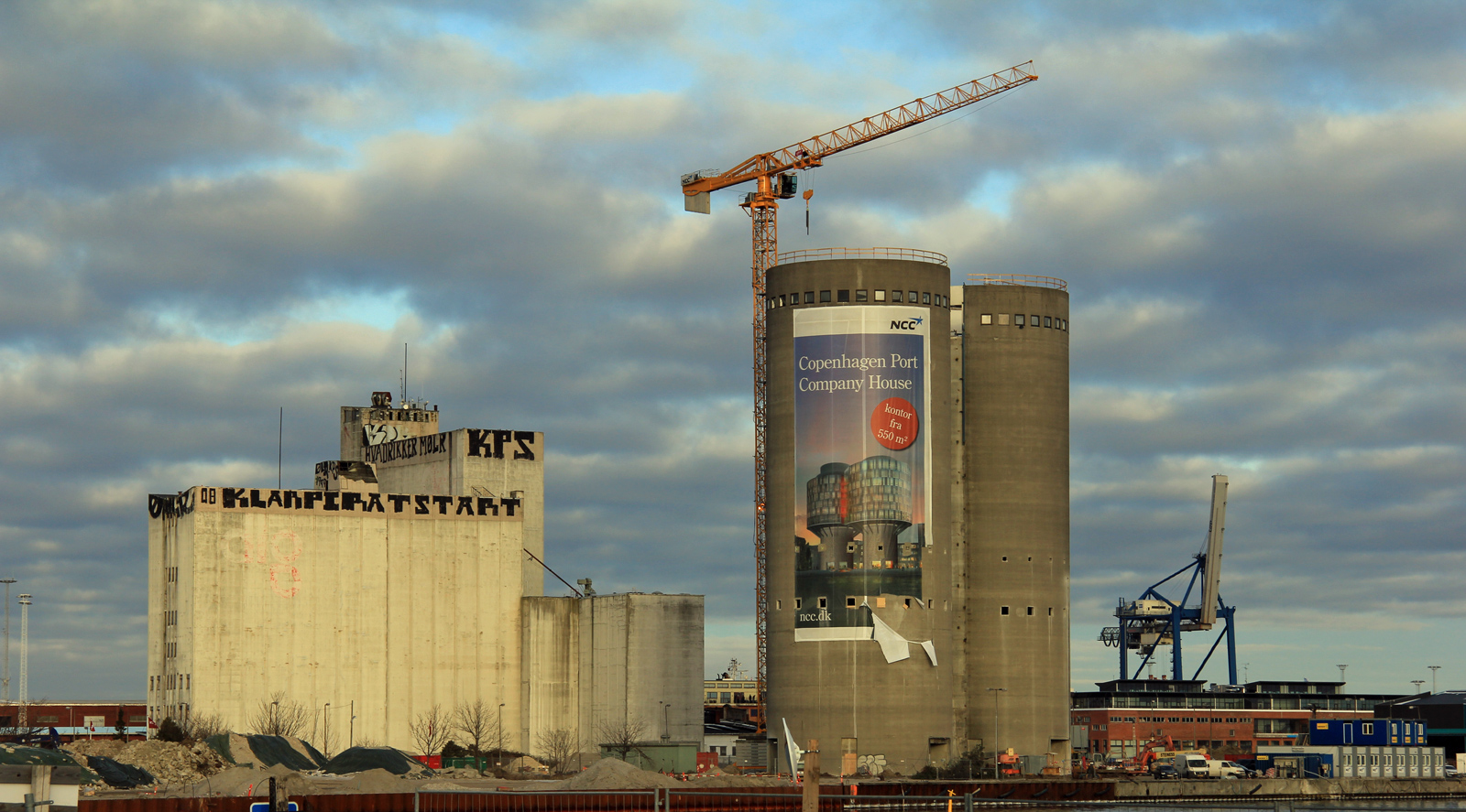 Silobygninger, Århusgadekvarteret, Nordhavnen